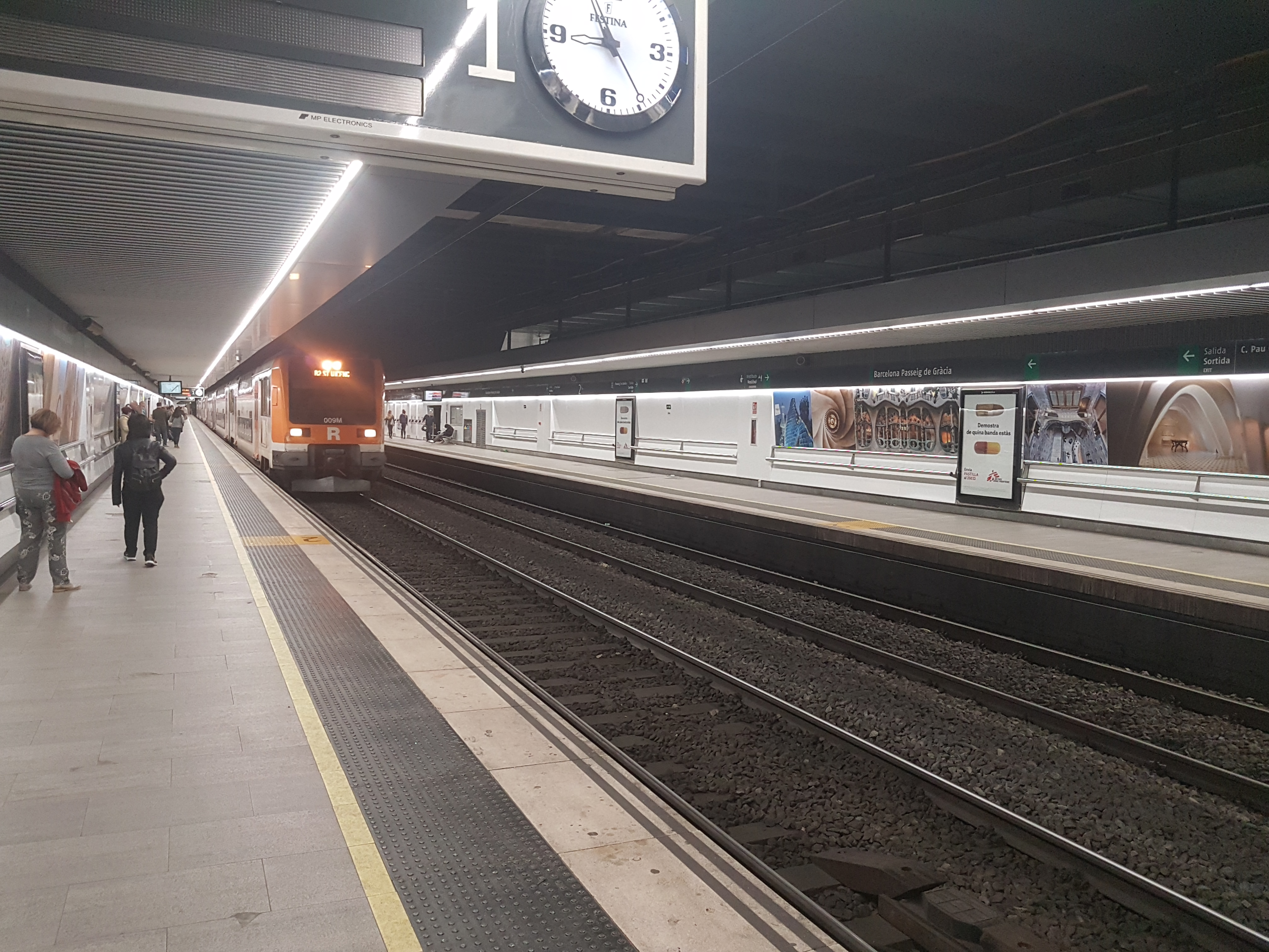 Unitat 450 a l'estació de Barcelona Passeig de Gràcia amb servei R2 direcció Sant Vicenç de Calders